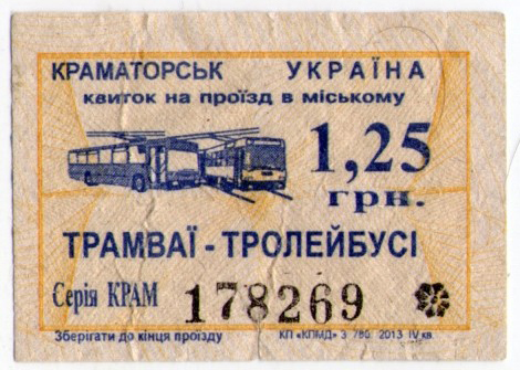 билет на трамвай и троллейбус в Краматорске